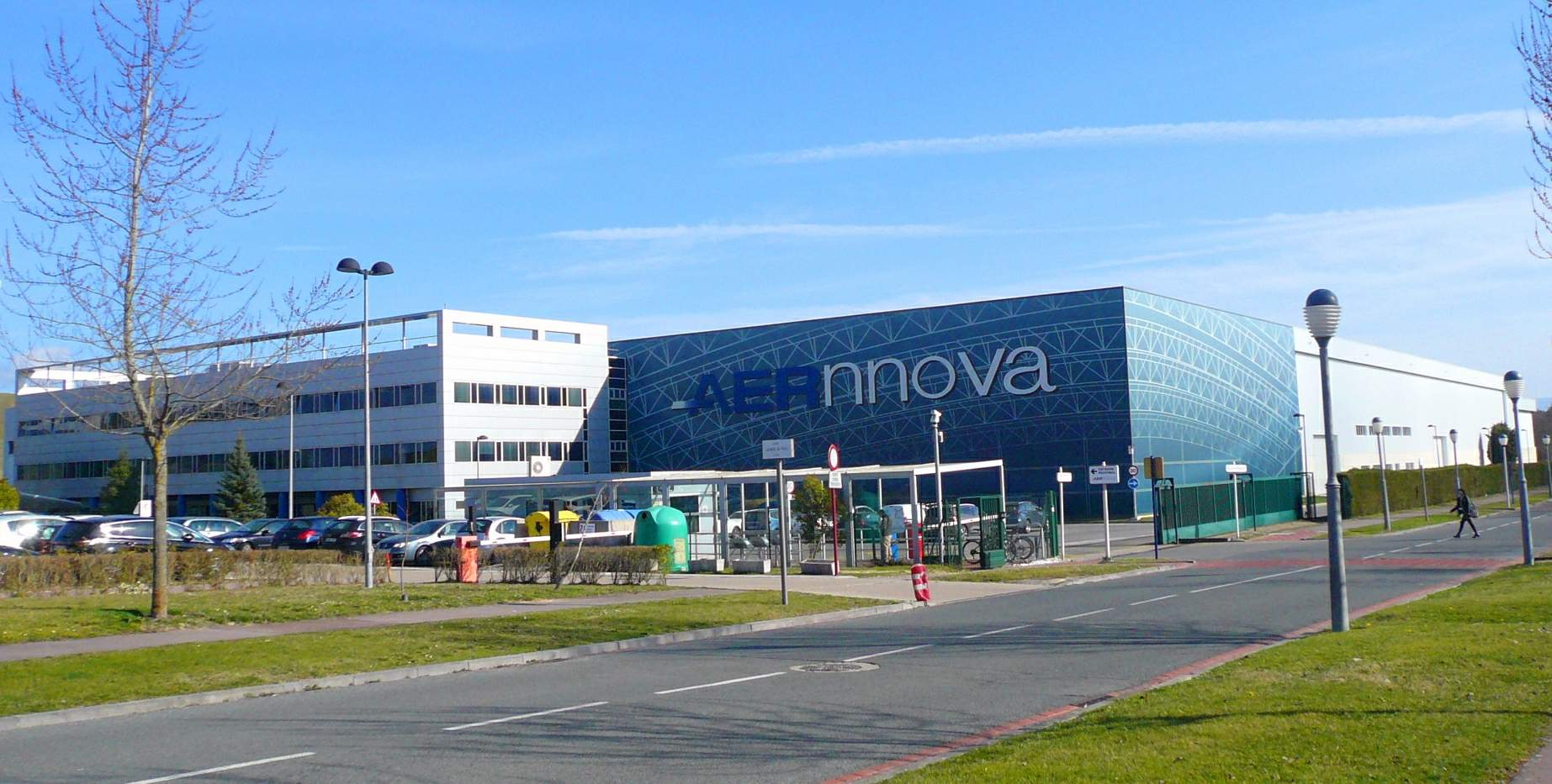 Sede central de Aernnova en el Parque Tecnológico de Álava (Miñano Menor, Vitoria)